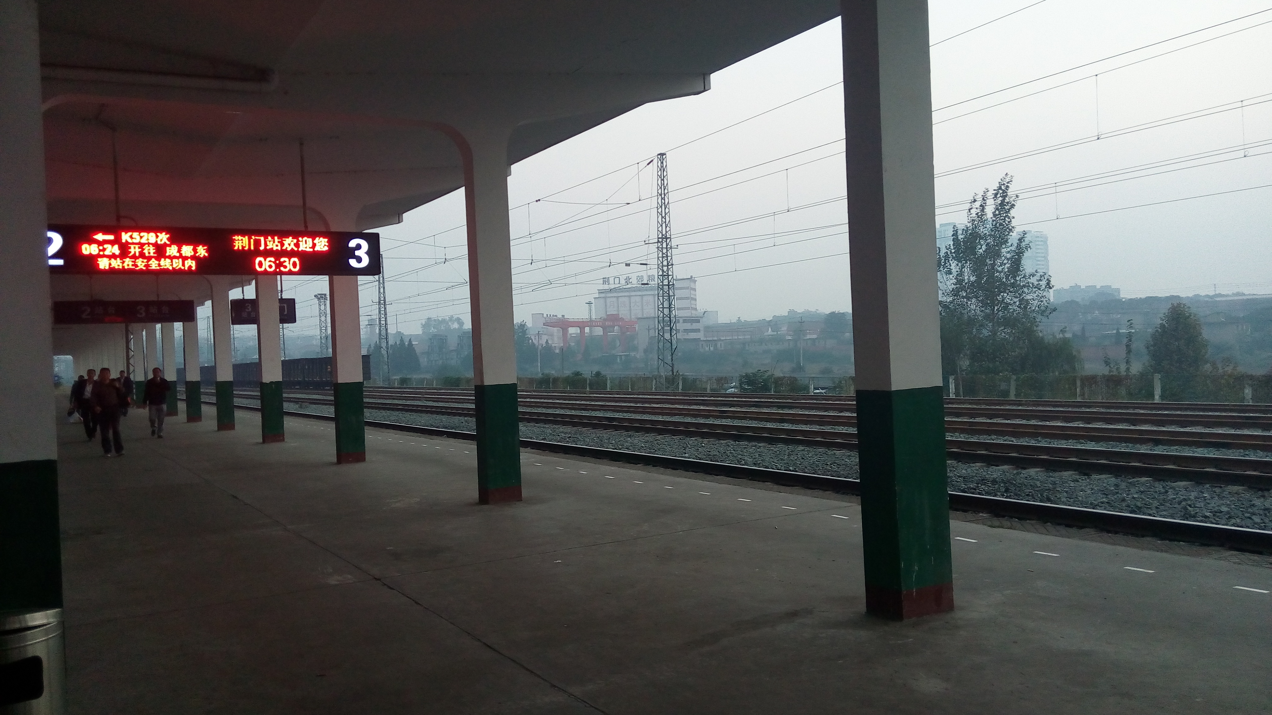 荆门站2、3站台